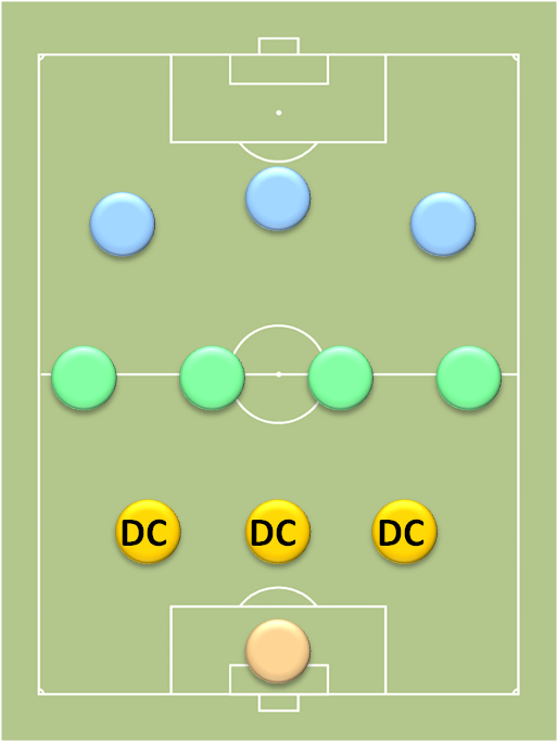 Positions_au_football_des_défenseurs_dans_un_3-4-3